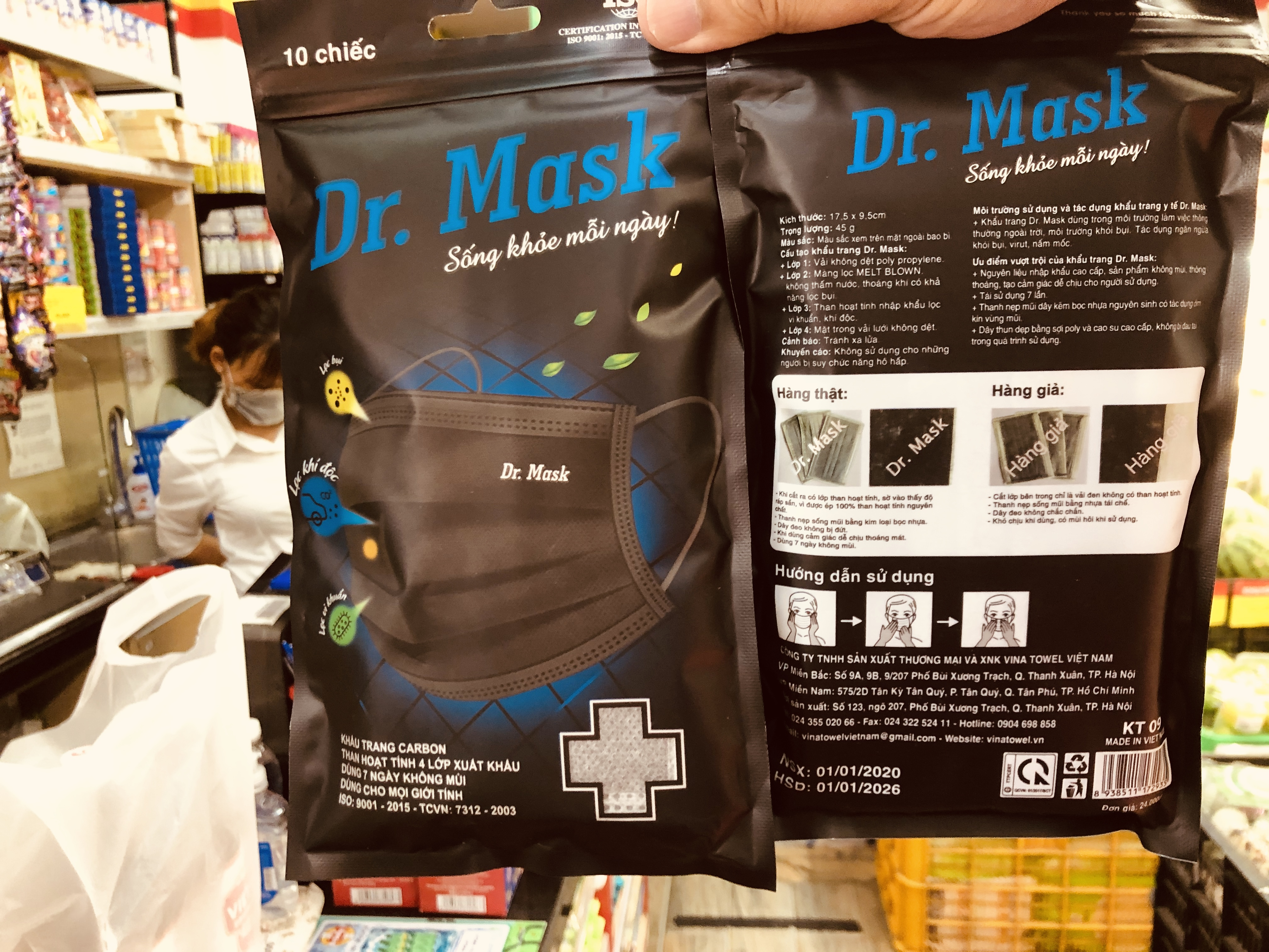 Khẩu trang y tế phòng chống COVID-19 bán tại VinMart+, Hà Nội